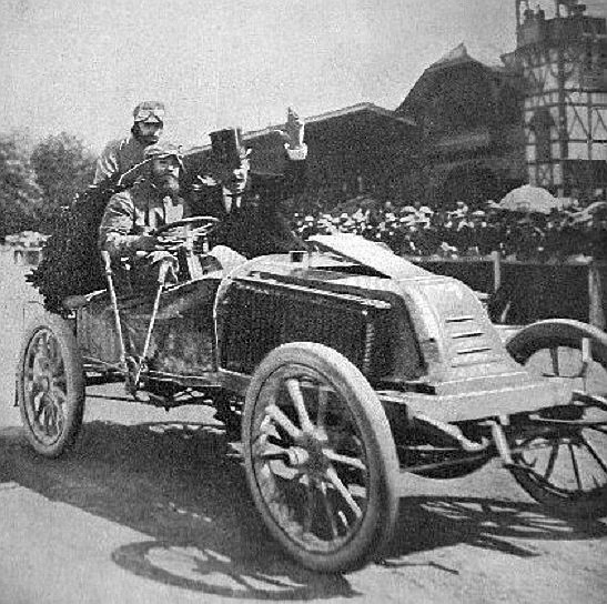 Marcel Renault vainqueur de Paris-Vienne 1902 sur Renault Type K. La vie au grand air n°199 du 3 juillet 1902 (couverture de 1ère édition)